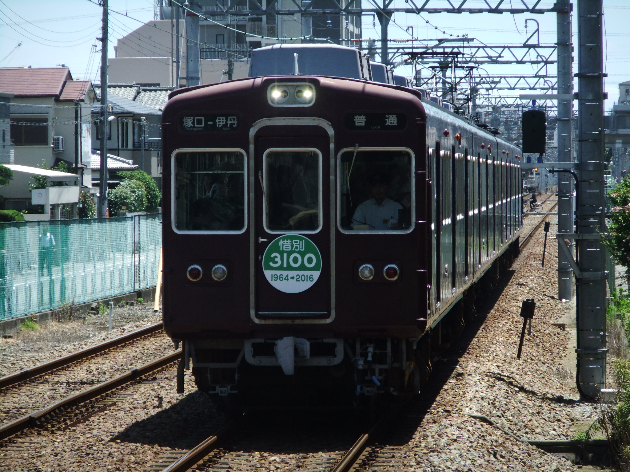 さよならヘッドマークを付けた阪急3100系3101 新伊丹駅付近